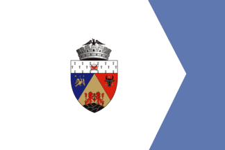 Flag of Alba Iulia municipality, Romania